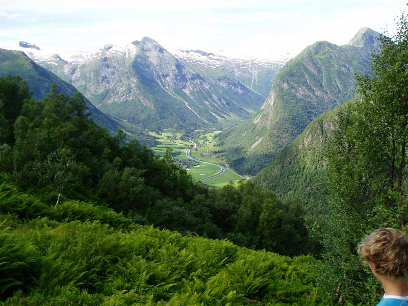 Utsikt fra Endrestølen mot Bøyadalen i Fjærland. Bildet er tatt privat, alle rettigheter frigitt.